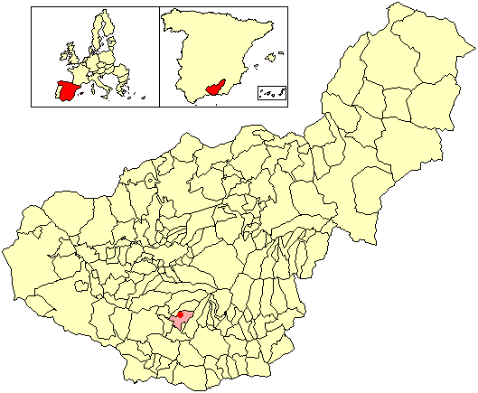 Situación de la localidad de Acequias (en el municipio de Lecrín) respecto a la provincia de Granada, en España.